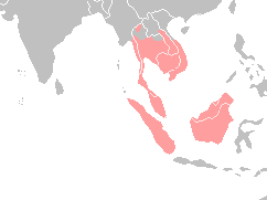 Description=Areale di distribuzione della specie